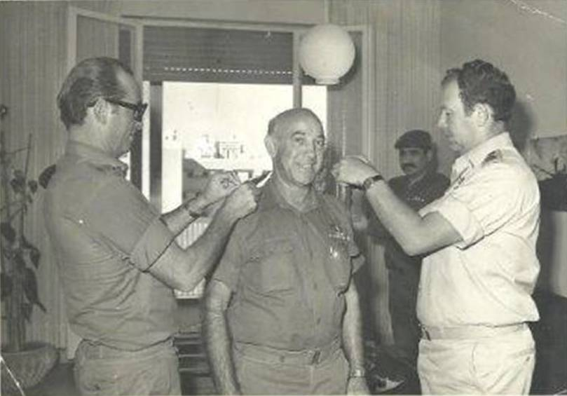 טקס הענקת דרגת אל"מ לזאב סלעי ע"י הרמטכ"ל מרדכי (מוטה) גור וראש מה"ד, אלוף אברהם רותם. ברקע אלוף יקותיאל (קותי) אדם.